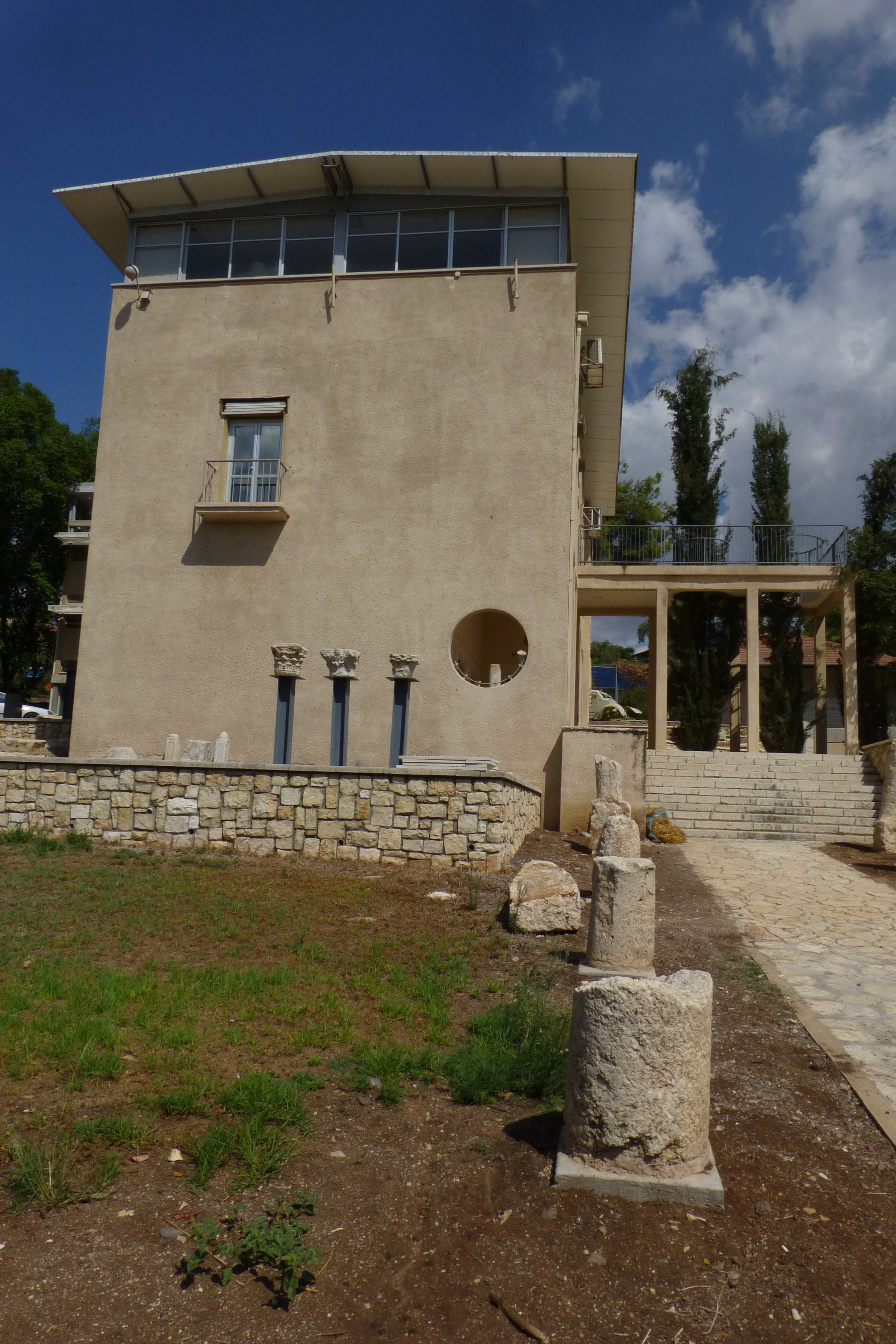 מוזיאון בית שטורמן המצוי בקיבוץ עין חרוד מאוחד נוסד בשנת 1941 על ידי חבר הקיבוץ שמואל סבוראי כמוזיאון לטבע.